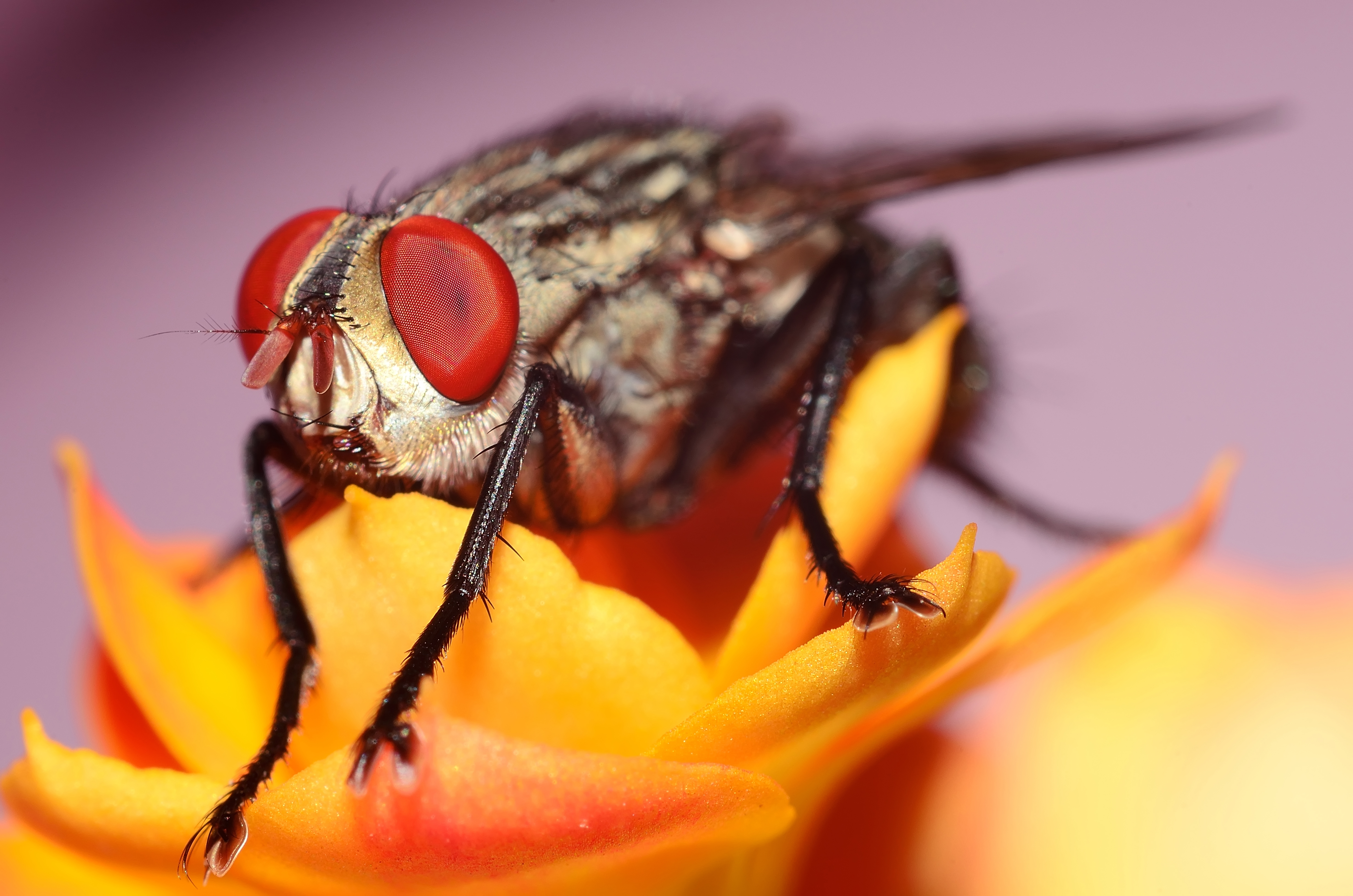 Mosca descansando sobre as flores. Macro com Lente 50mm invertida sobre tubos de imagens. Abertura F11